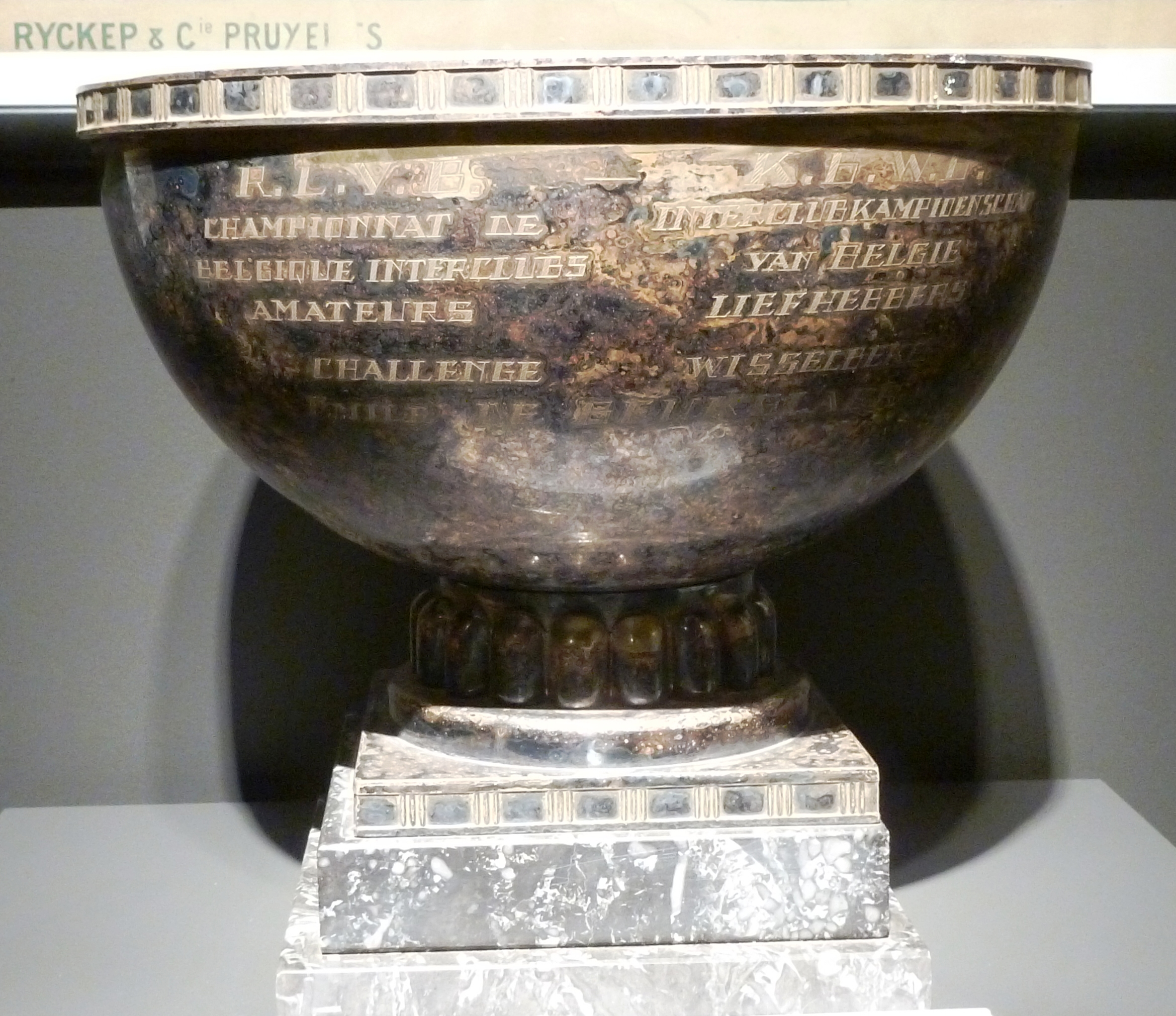 Trofée Challenge Émile De Beukelaer, im National Wielermuseum in Roeselaere, Belgien, für die beste Amateurmannschaft Belgiens